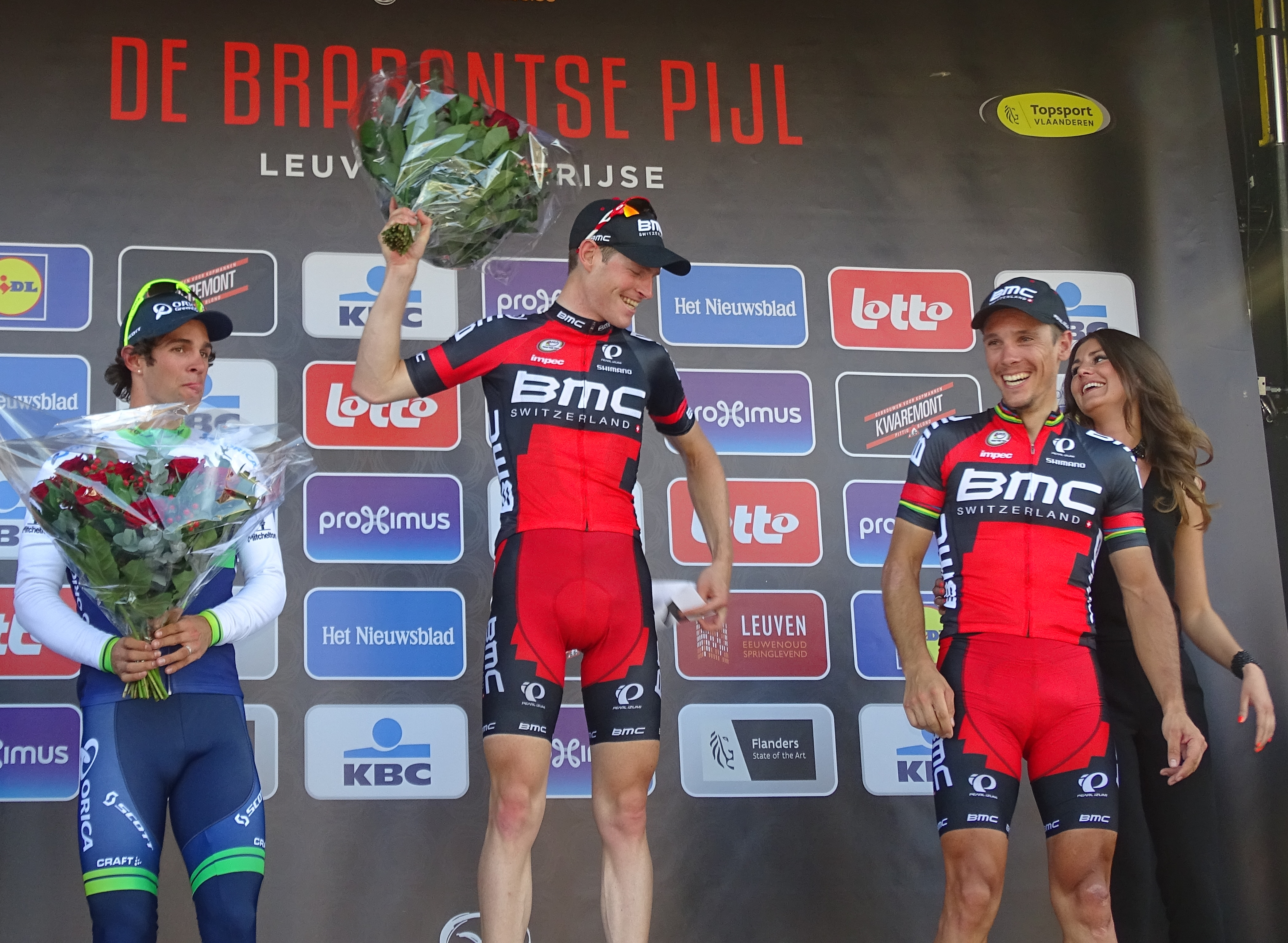 Reportage réalisé le mercredi 15 avril à l'occasion de l'arrivée de la Flèche brabançonne 2015 à Overijse, Belgique.